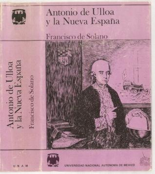 Portada de uno de los libros de Francisco de Paula Solano Pérez-Lila.